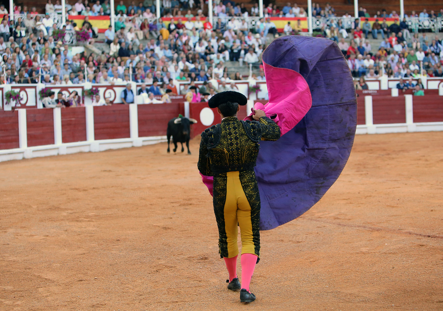 El subalterno a la salida del toro, lo alegra, citándolo de lejos con el capote, Gijón, 12.8.2017